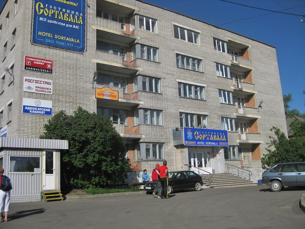 Гостиница «Сортавала», 5 этажное здание в самом центре города.